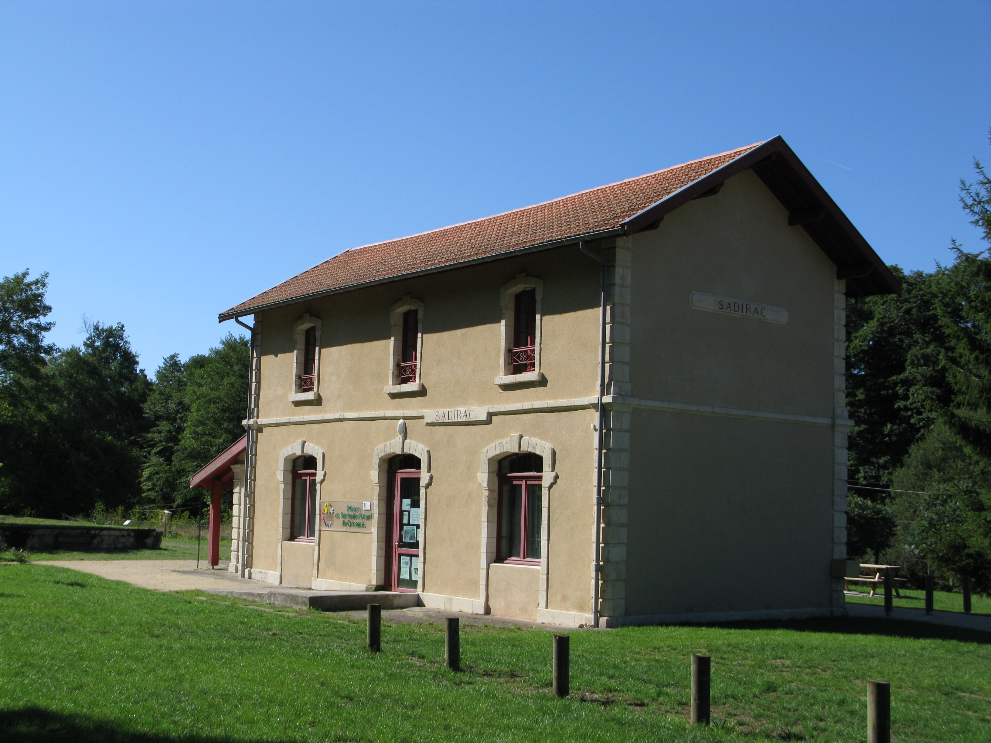 L'ancienne gare de Sadirac, le long de la piste Roger Lapébie